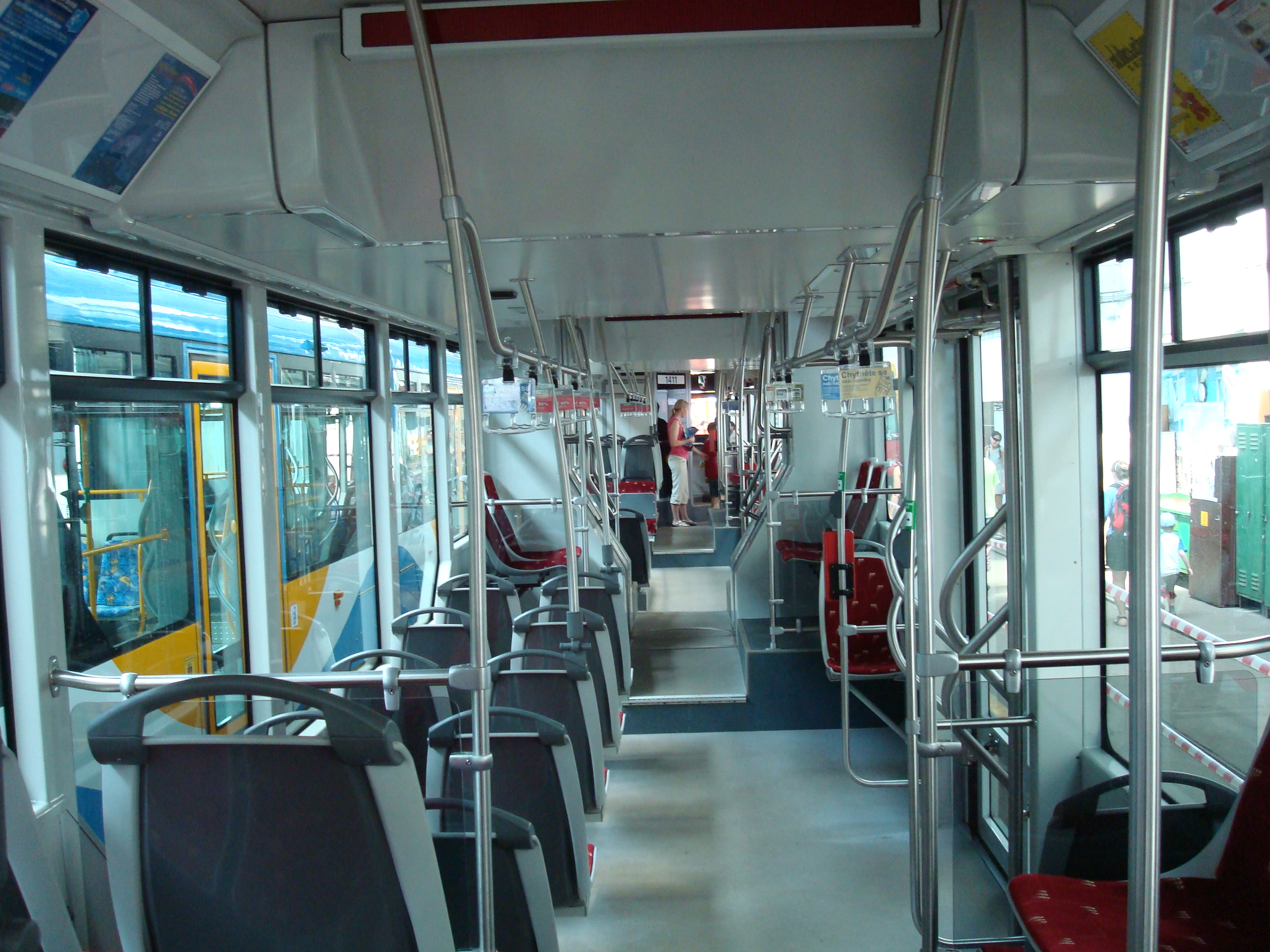 Ostrava